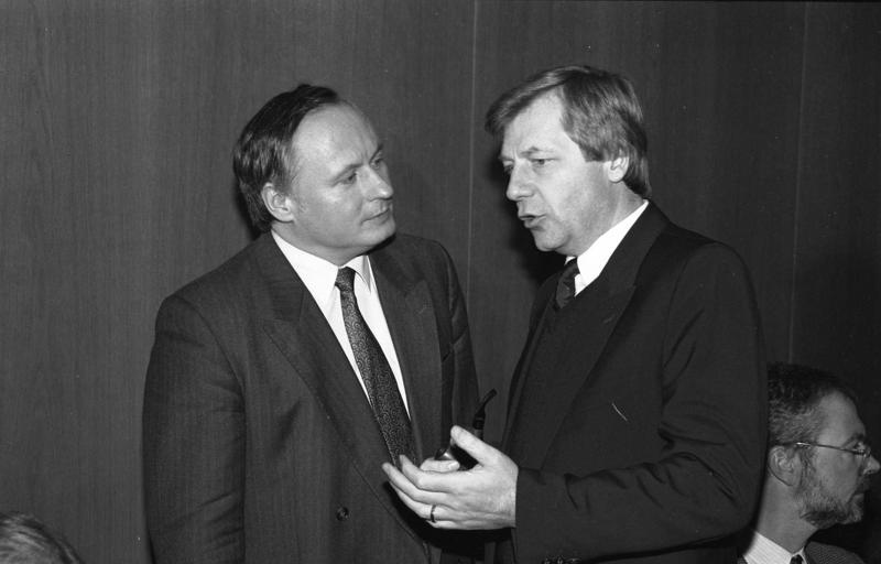 18.12.1986 Beratung der Ministerpräsidenten der Länder über einen Medien-Staatsvertrag in der Landesvertretung Hessen